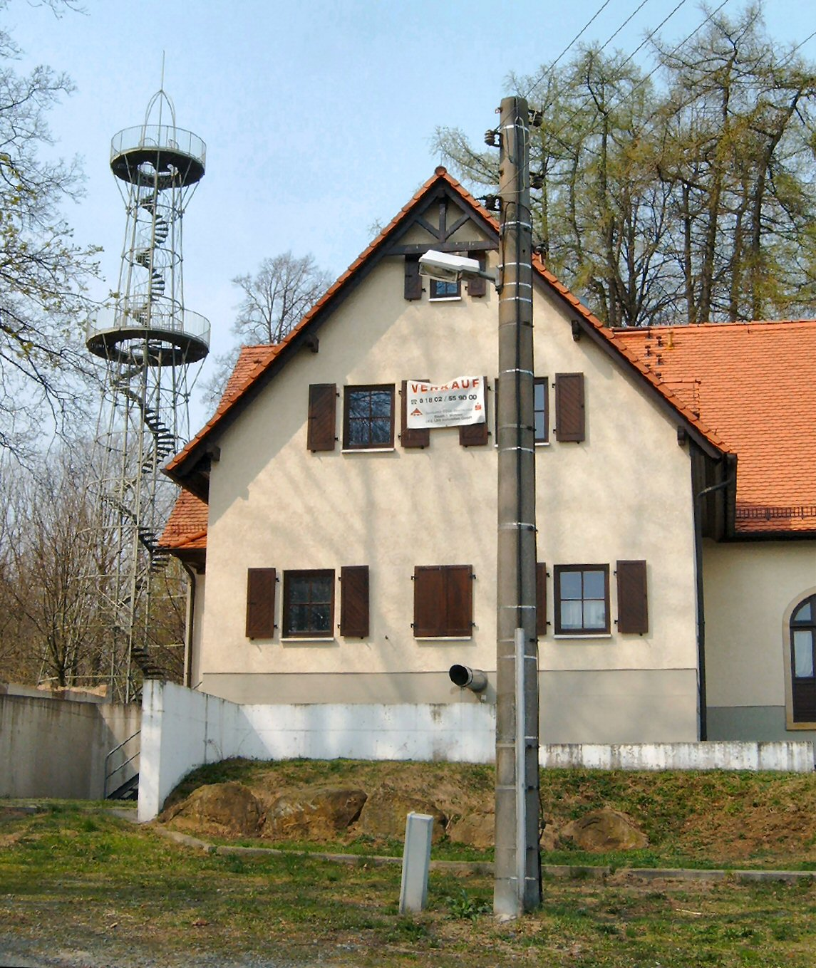 Götzinger Höhe in Neustadt/Sachsen: Berggasthof und Aussichtsturm